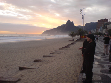 Ipanema boulevard